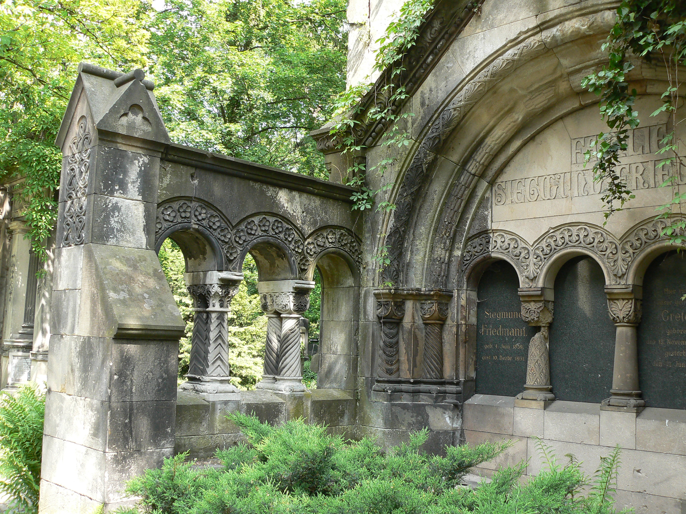 Grobowiec Friedmannów na Starym Cmentarzu Żydowskim we Wrocławiu